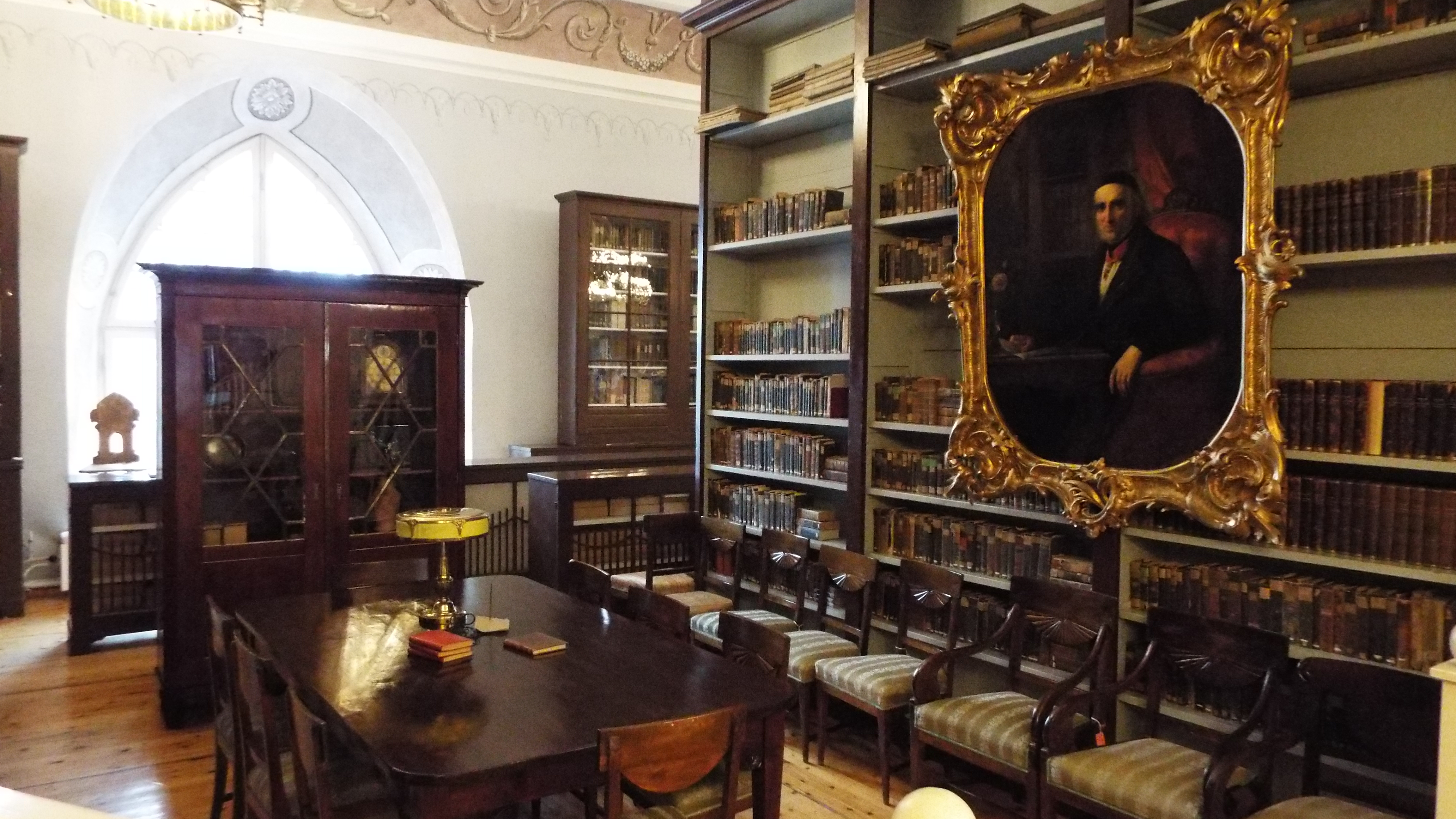 Tartu Ülikooli muuseum Morgensterni saal